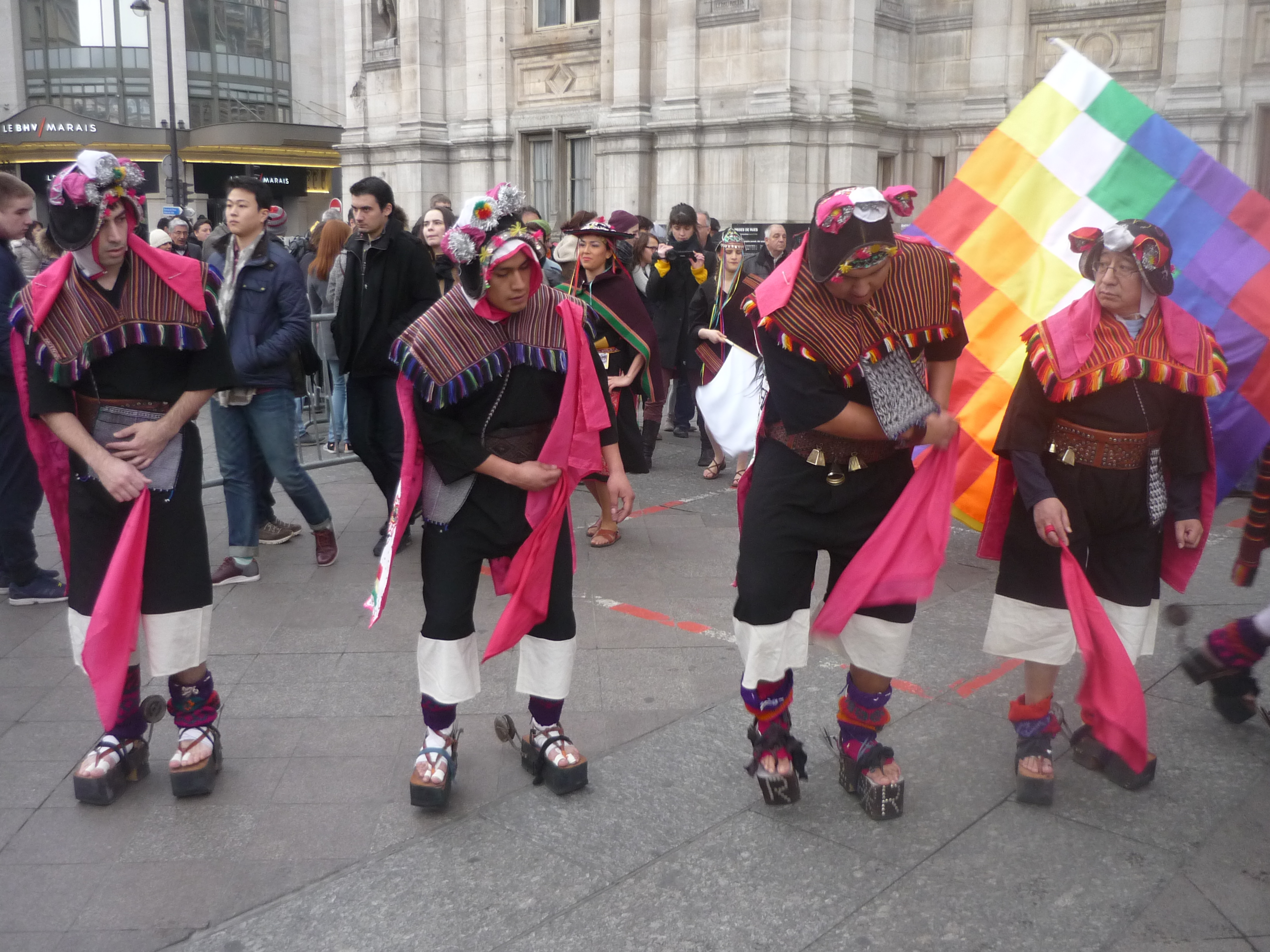 Boliviens place de l'Hôtel-de-Ville - Paris